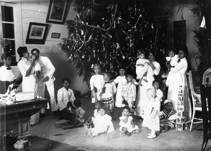 Foto. Kerstfeest